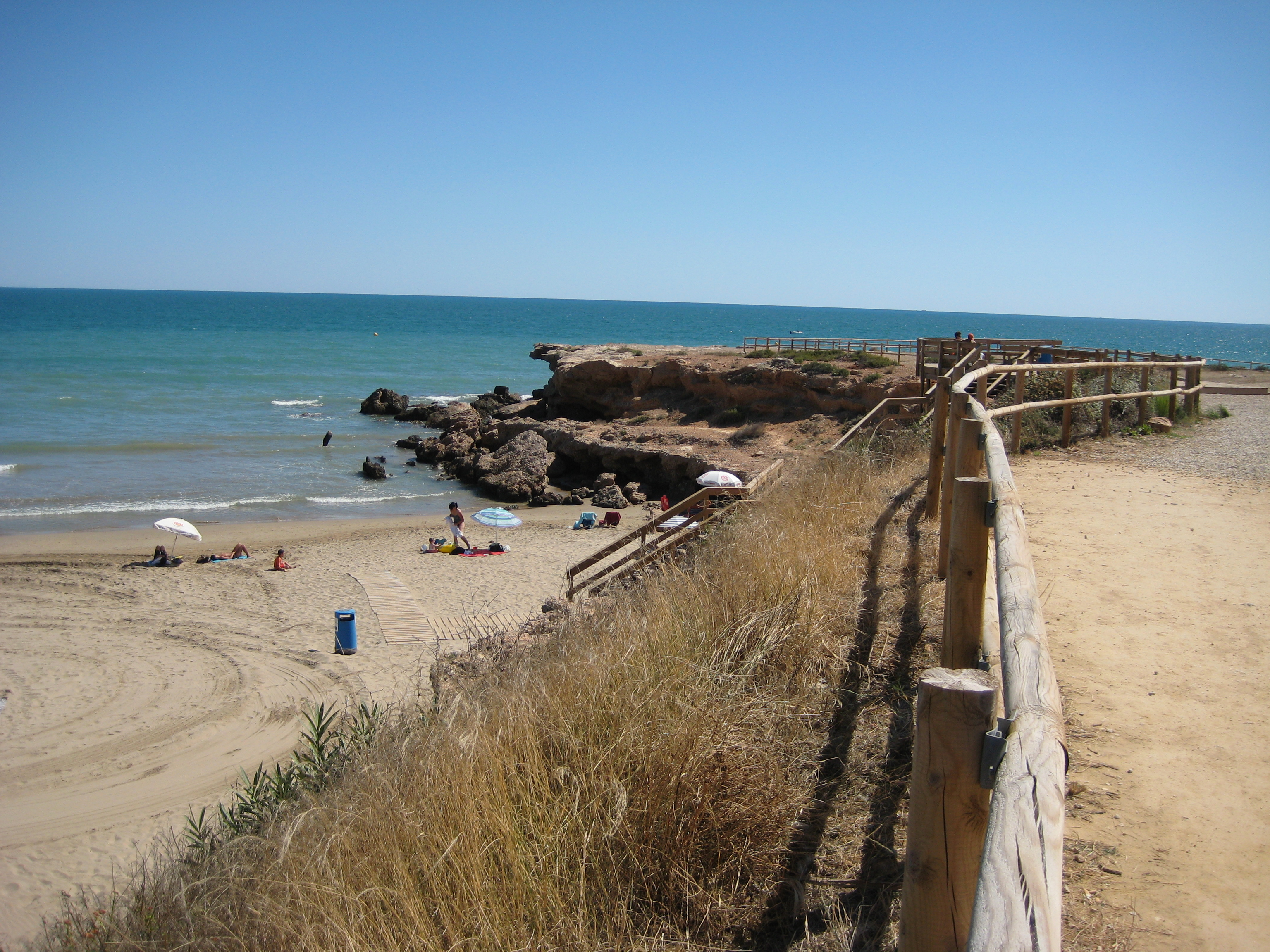 Roquer de la Romana, límit sud de la platja de la Romana d'Alcalà de Xivert